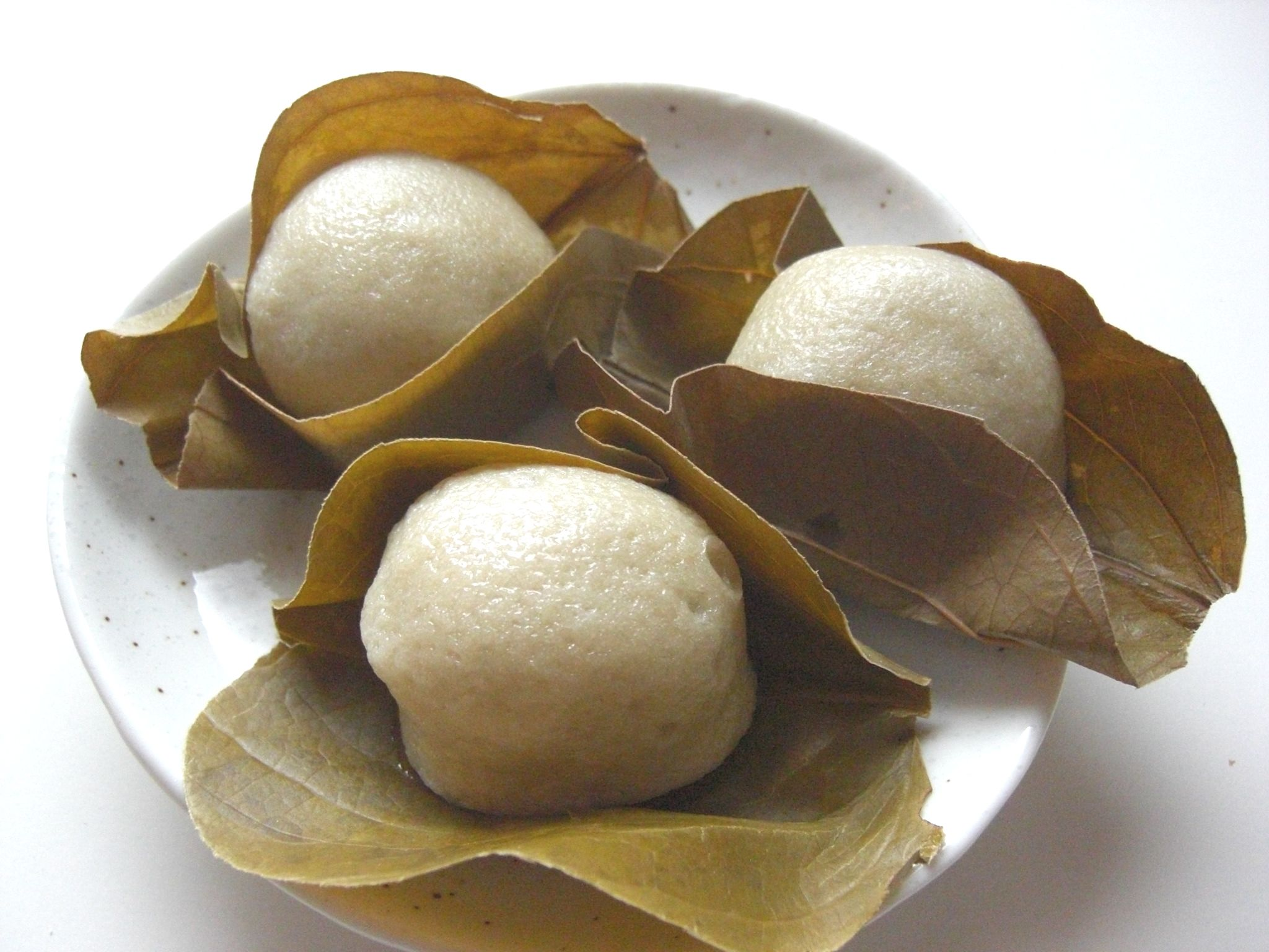 麩饅頭 こし餡 葉はサルトリイバラ